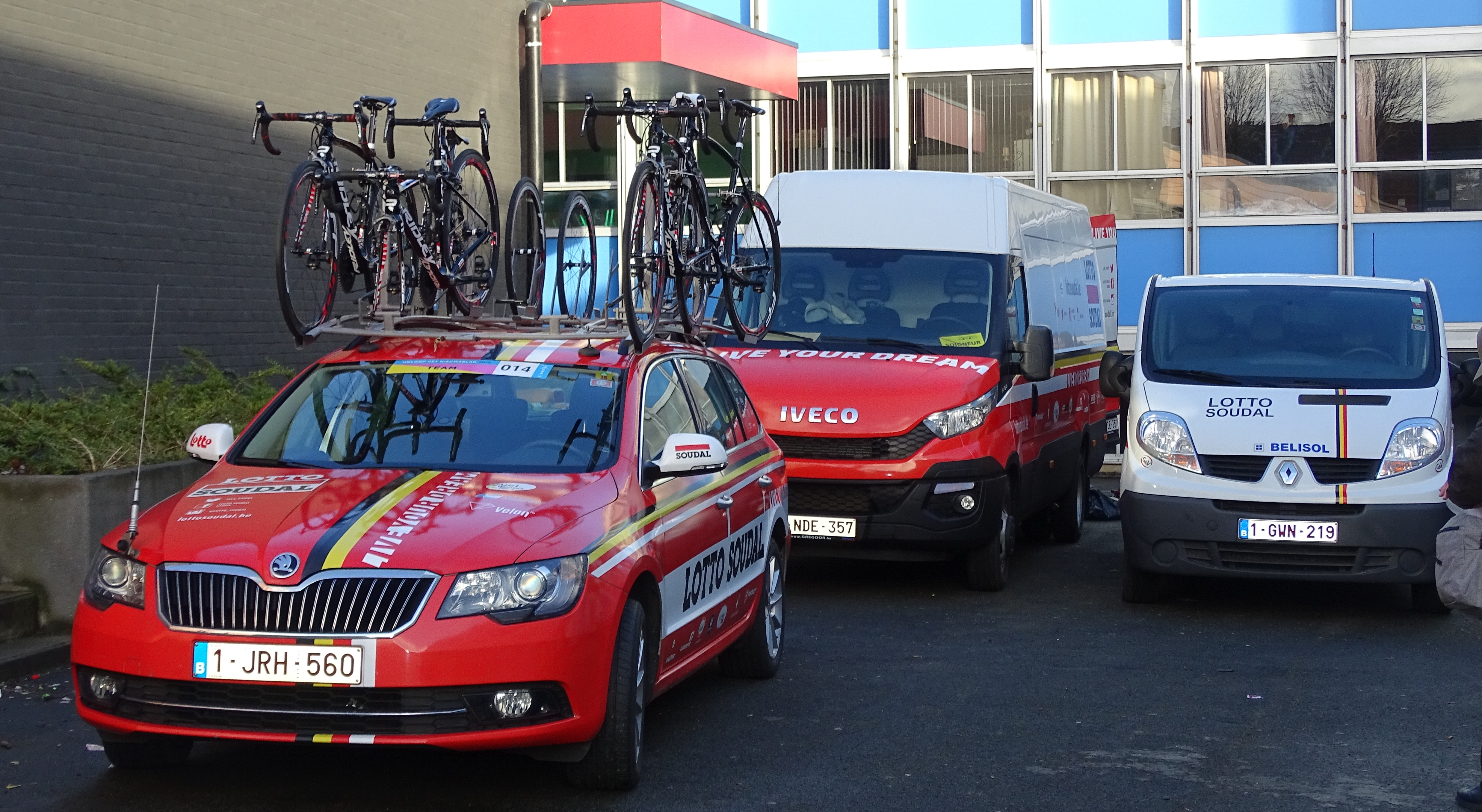 Reportage réalisé le mercredi 2 mars à l'occasion du départ du Samyn des Dames 2016 et du Samyn 2016 à Quaregnon, Belgique.